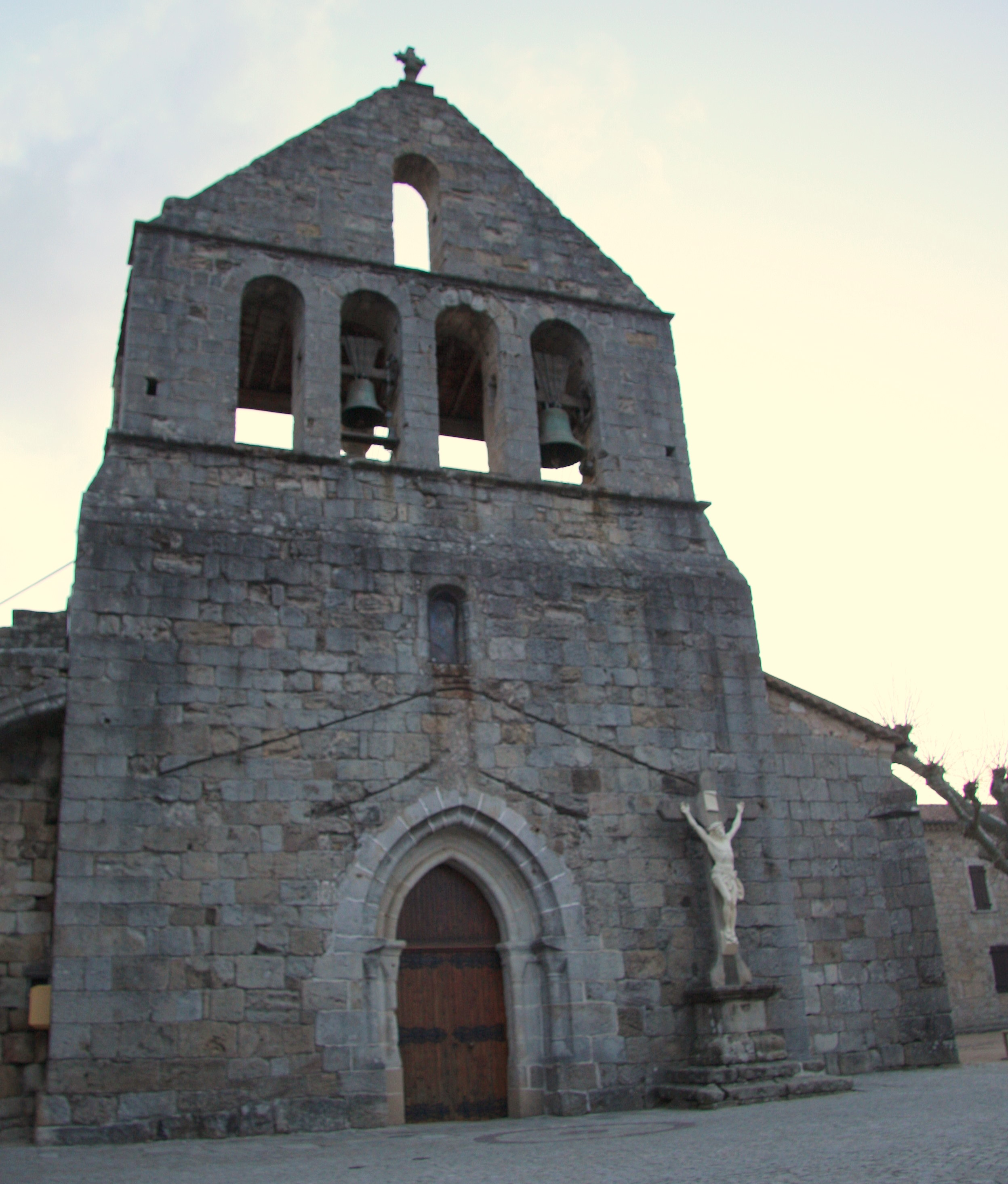 Façade église romane Saint André à Ailhon. Classée monument historique par arrêté du 15 novembre 1926.